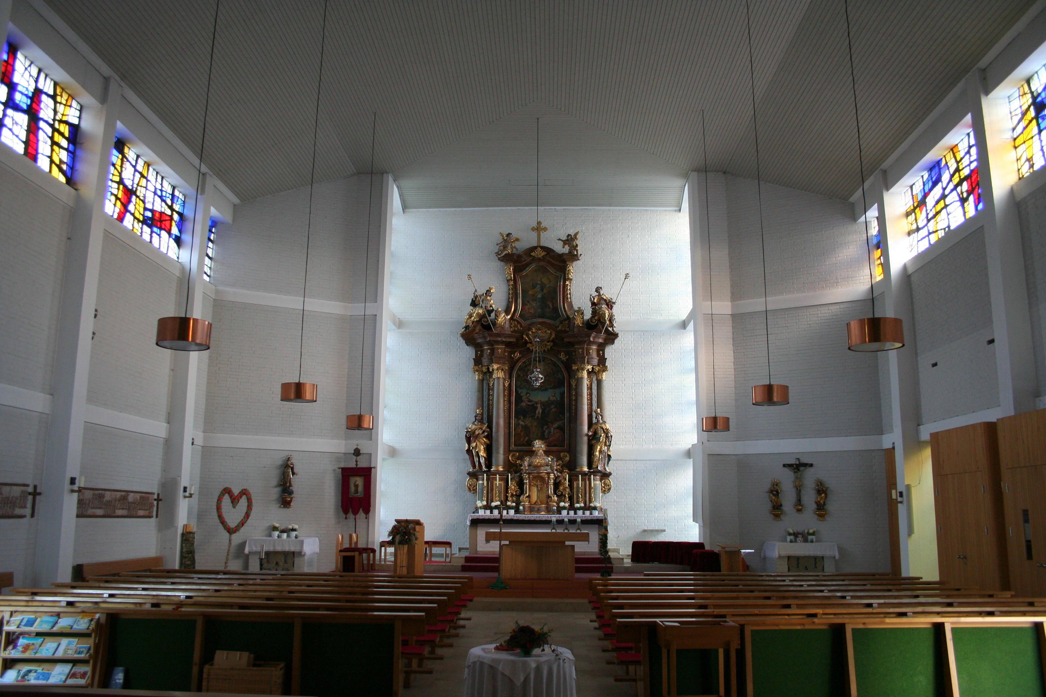 Kath. Pfarrkirche hl. Anna